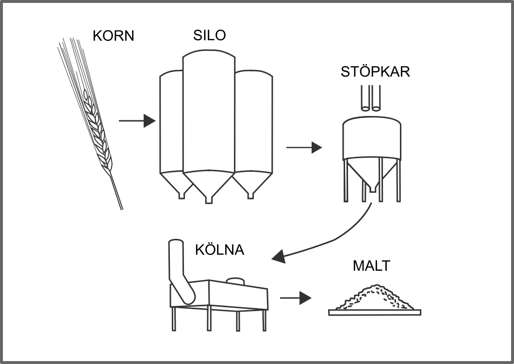 Principskiss för ett mälteri.